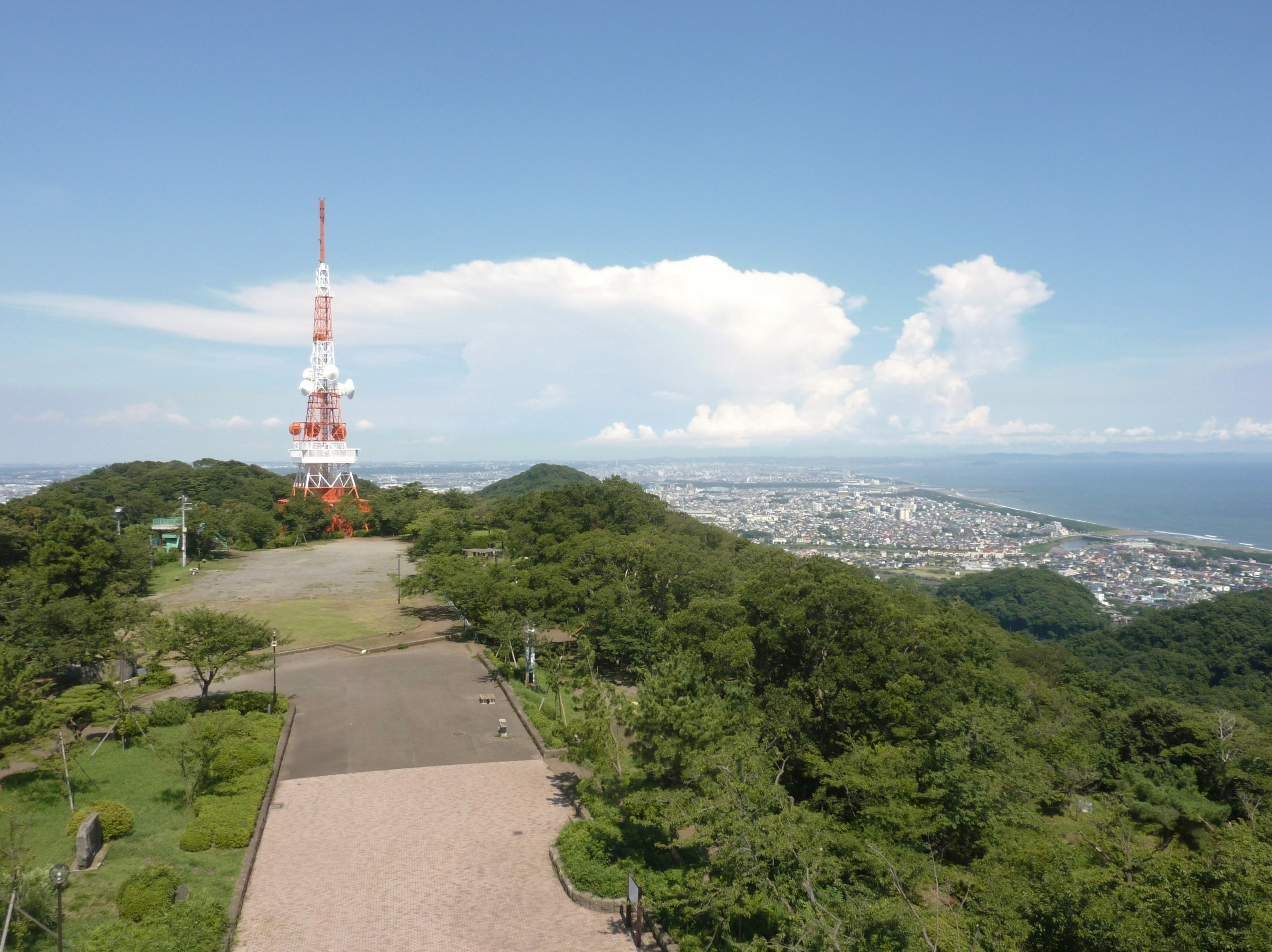 神奈川県平塚市・大磯町 湘南平